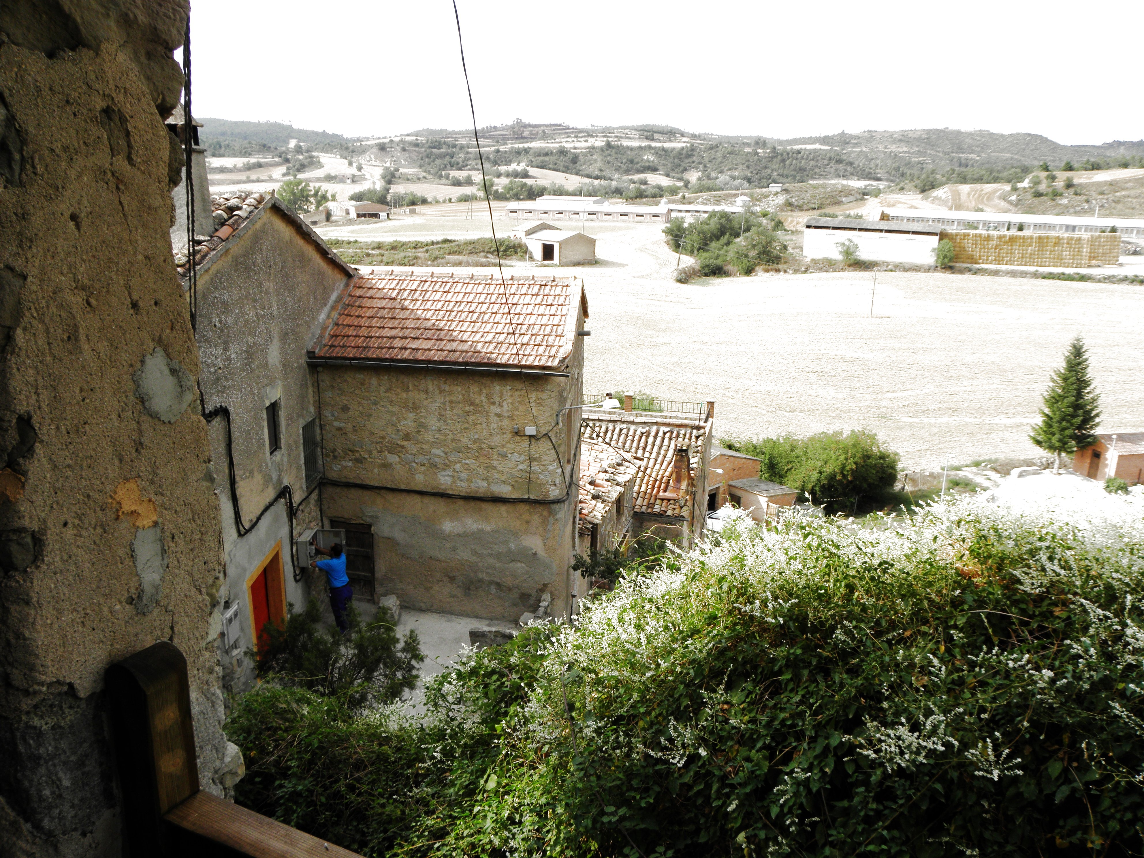 Enfesta (La Molsosa, Solsonès). Cases del poble vistes des de la pujada al castell.